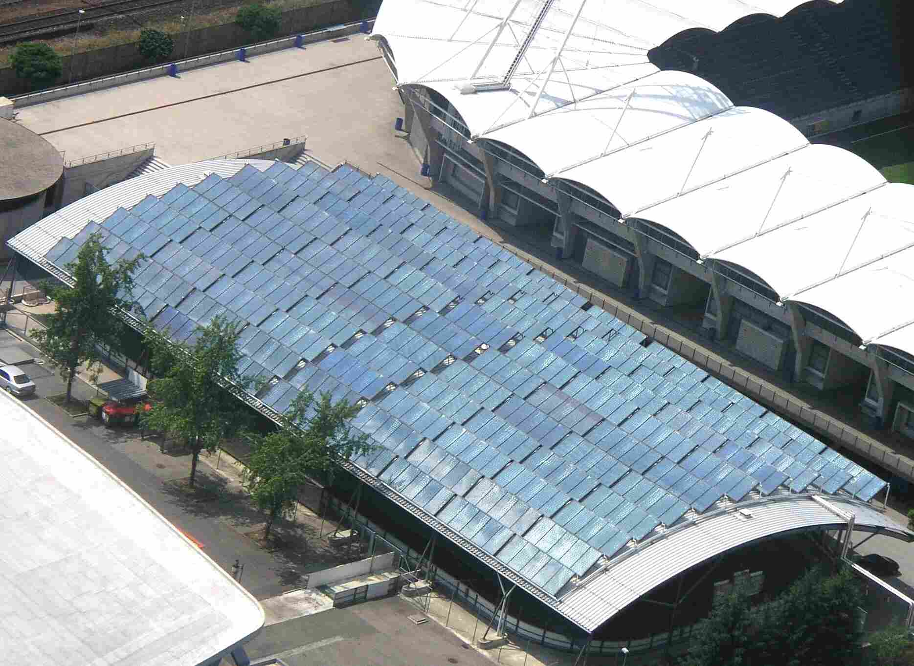 Solarthermische Grossanlage UPC Arena Graz